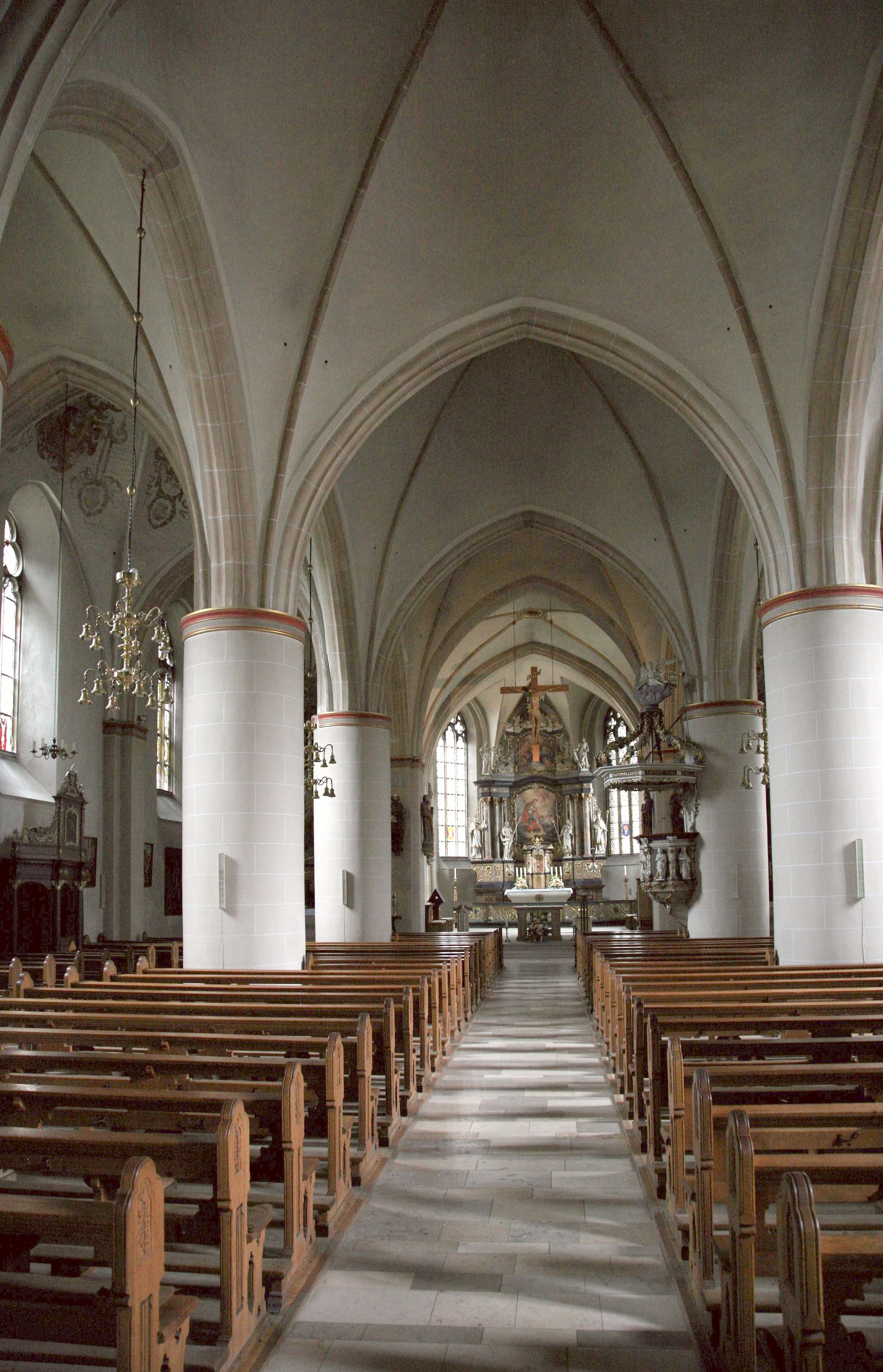 Vechta, Propsteikirche St. Georg, Inneres